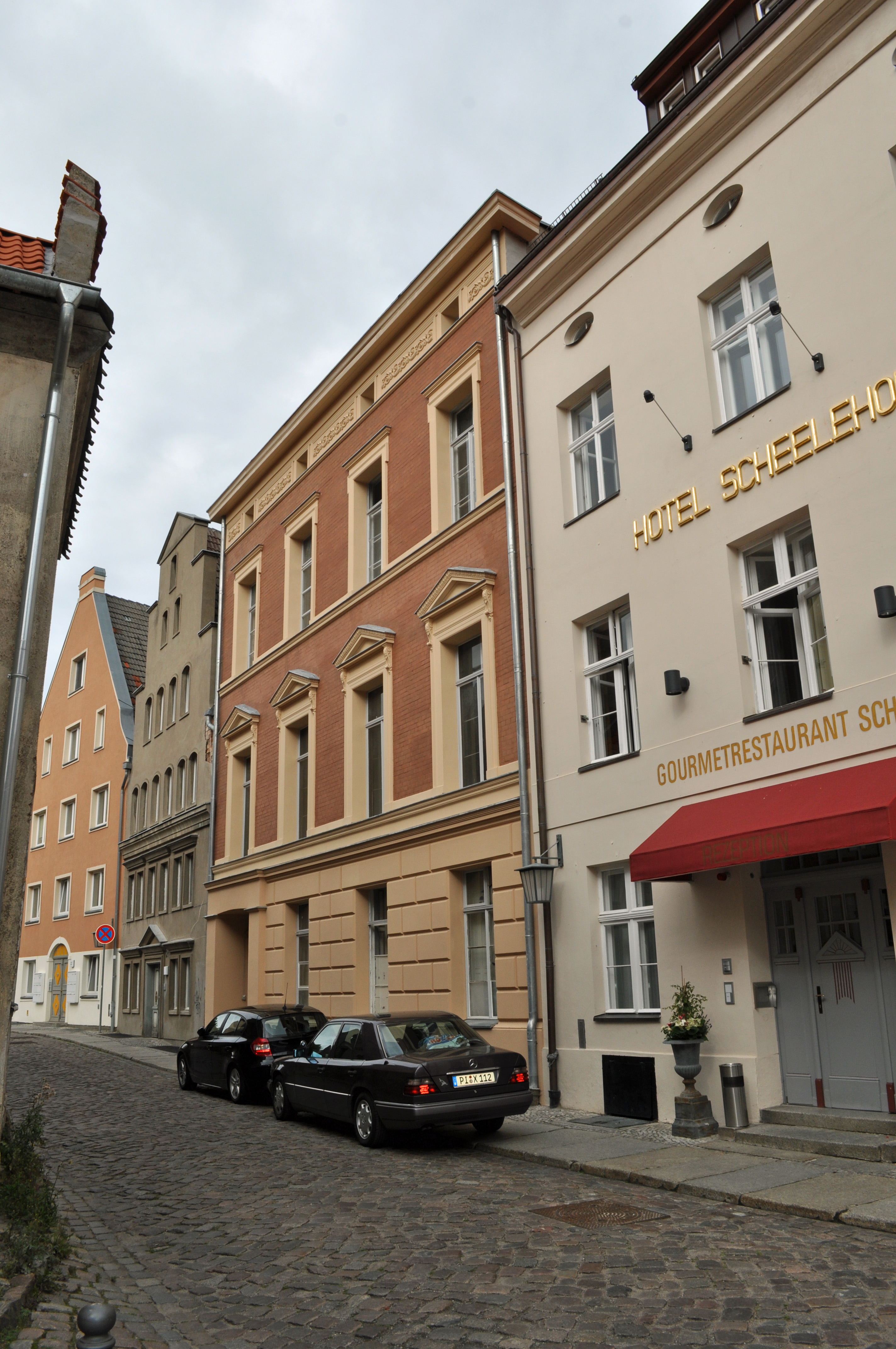 Stralsund, Schillstraße 20 (2012-09-15), by Klugschnacker in Wikipedia